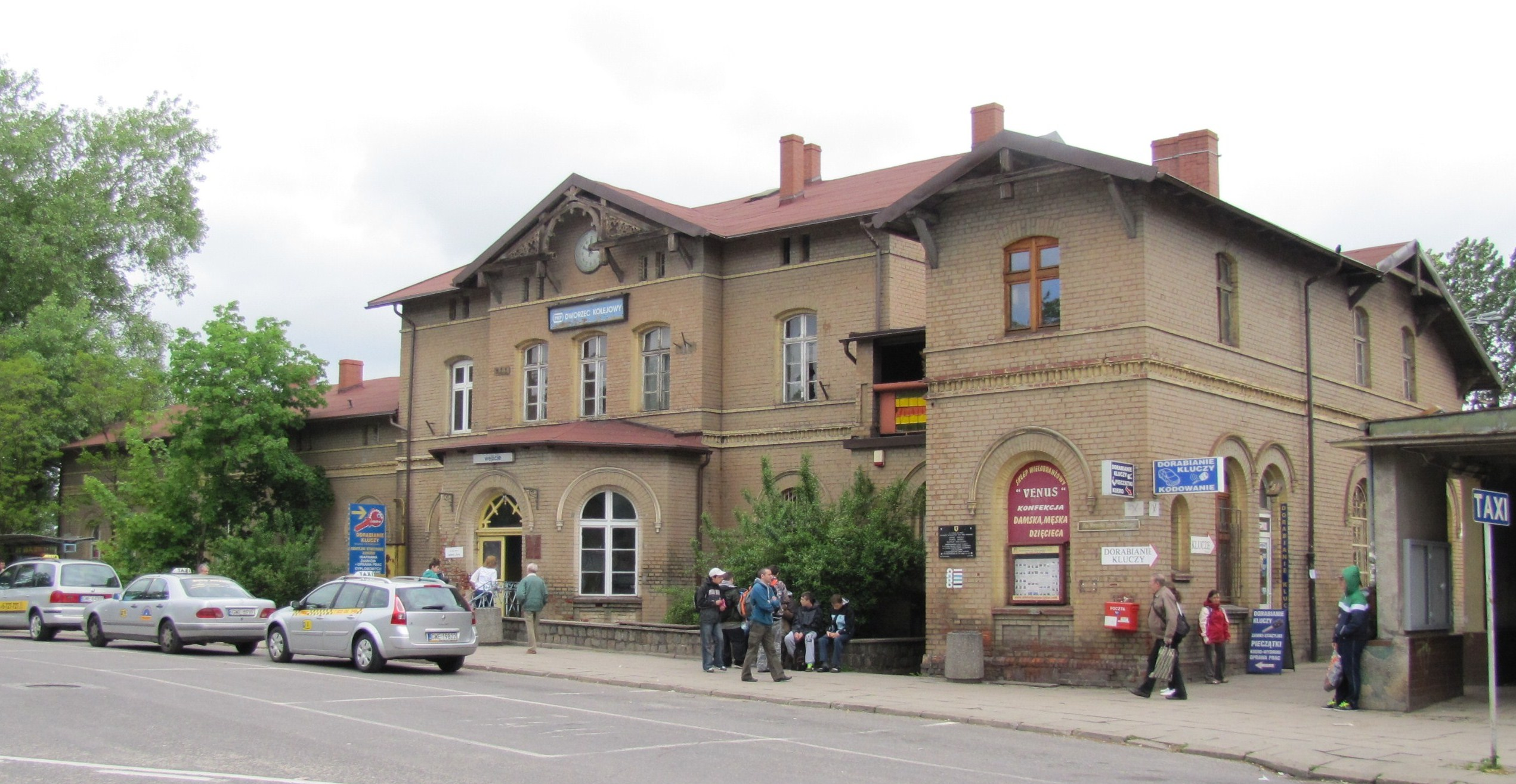 Dworzec PKP.